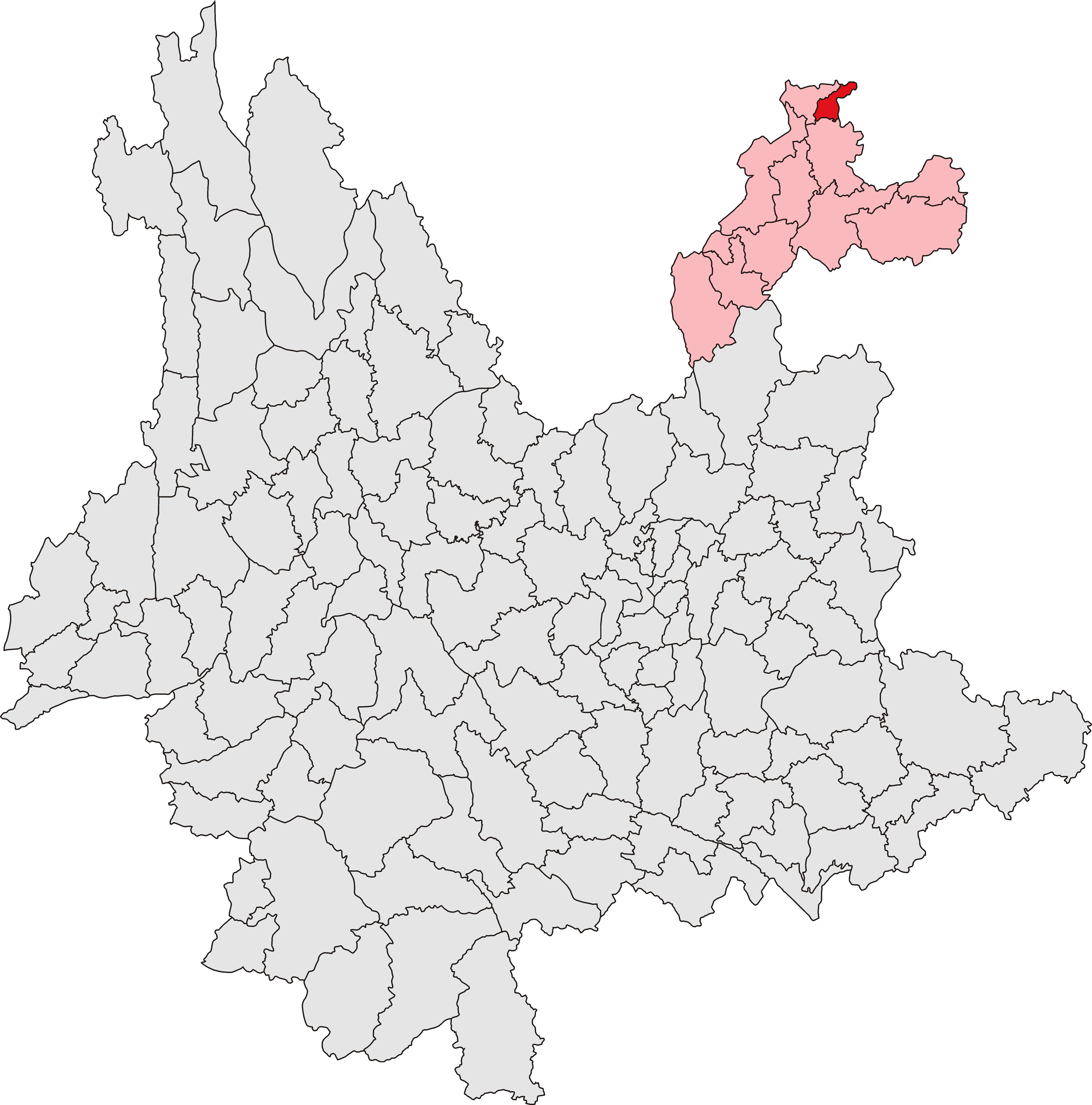 中文（中国大陆）: 水富县位置图